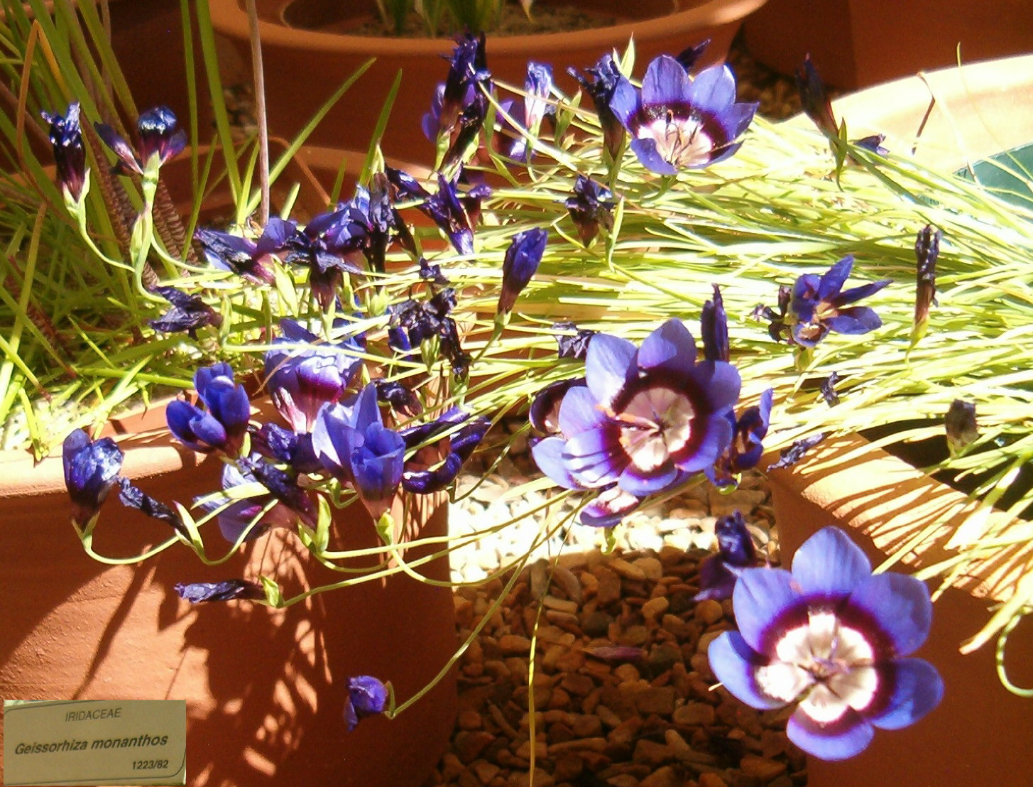 At Kirstenbosch National Botanical Gardens Genus Geissorhiza